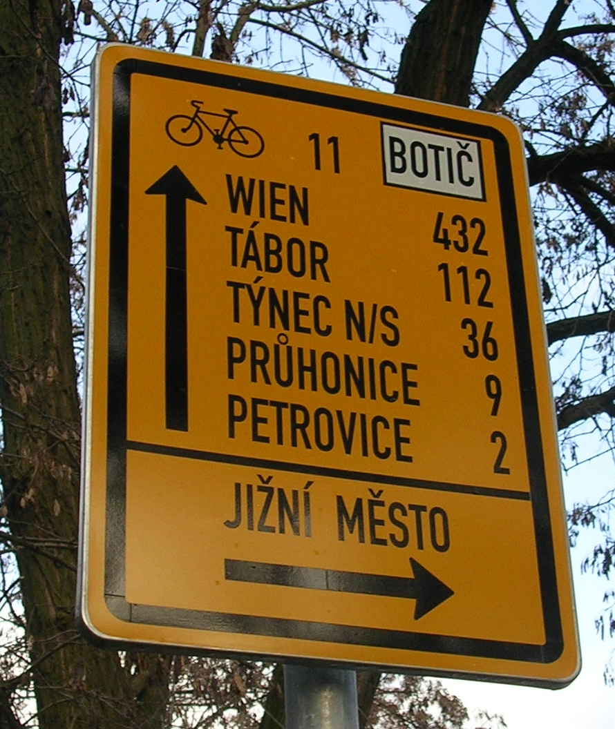 Cyklotrasa č. 11, přehrada Praha-Hostivař. Dopravní značka IS 20 "Návěst před křižovatkou pro cyklisty". - Google Maps - Google Earth